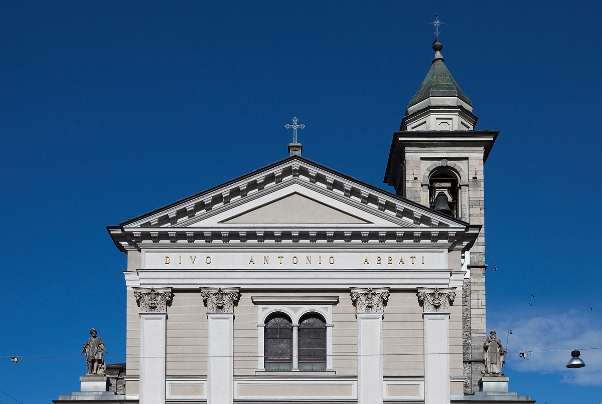 Kirche S. Antonio Abate in Locarno